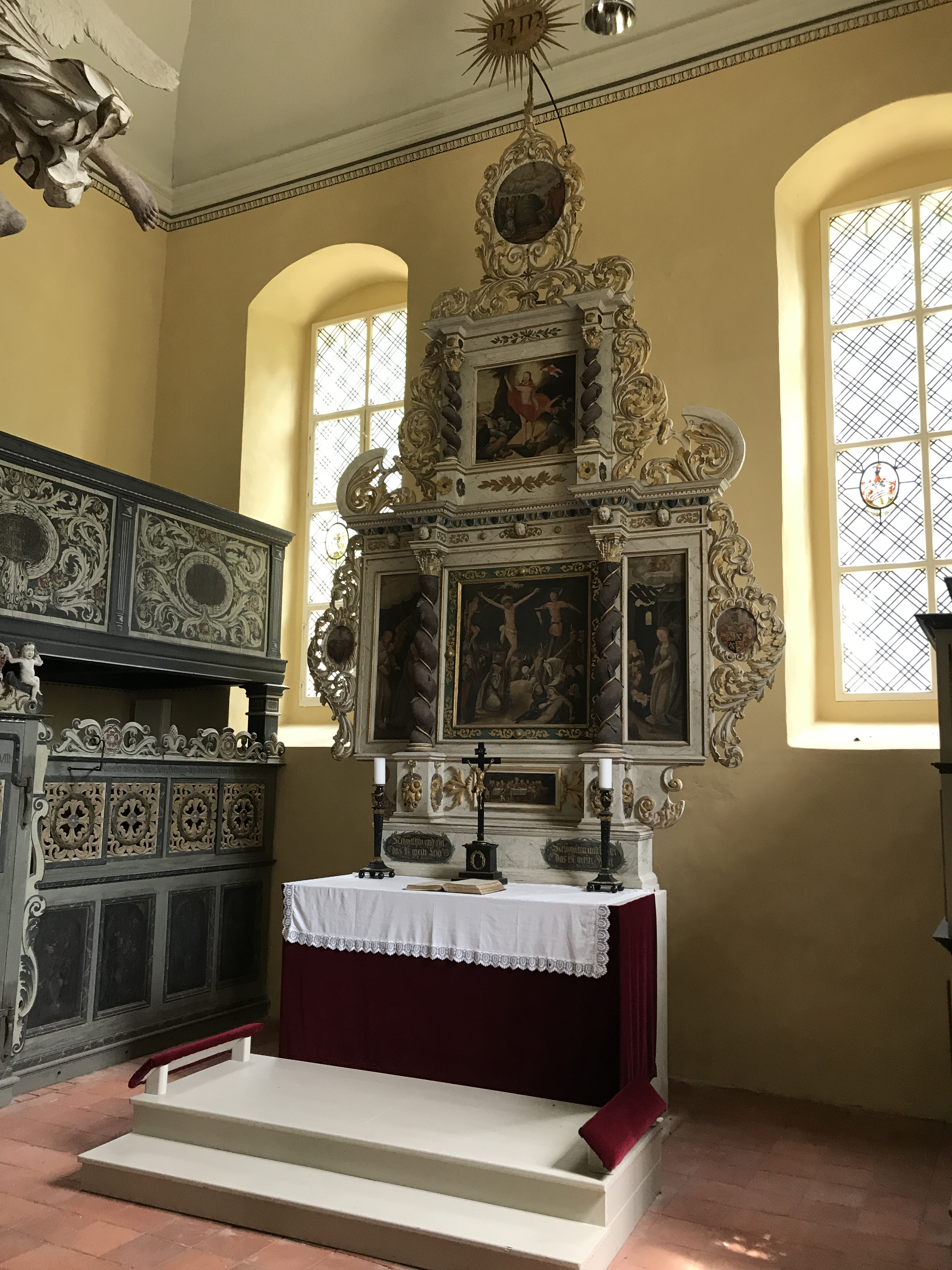 Die Dorfkirche Ahlsdorf ist eine Feldsteinkirche aus dem 14. Jahrhundert in Ahlsdorf, einem Ortsteil der Kleinstadt Schönewalde im Landkreis Elbe-Elster. Der Innenraum ist reich ausgestattet.